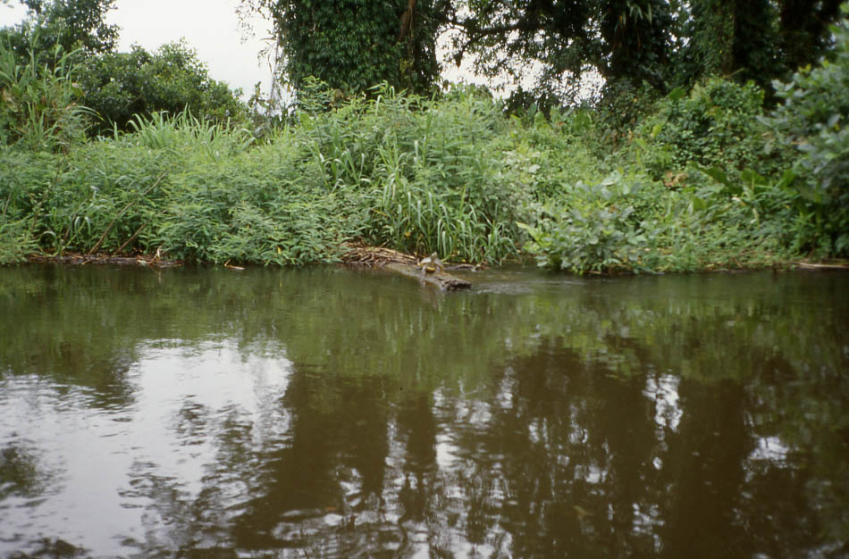 Refugio de vida salvaje Los Guatuzos, Río San Juan, Nicaragua. 2002